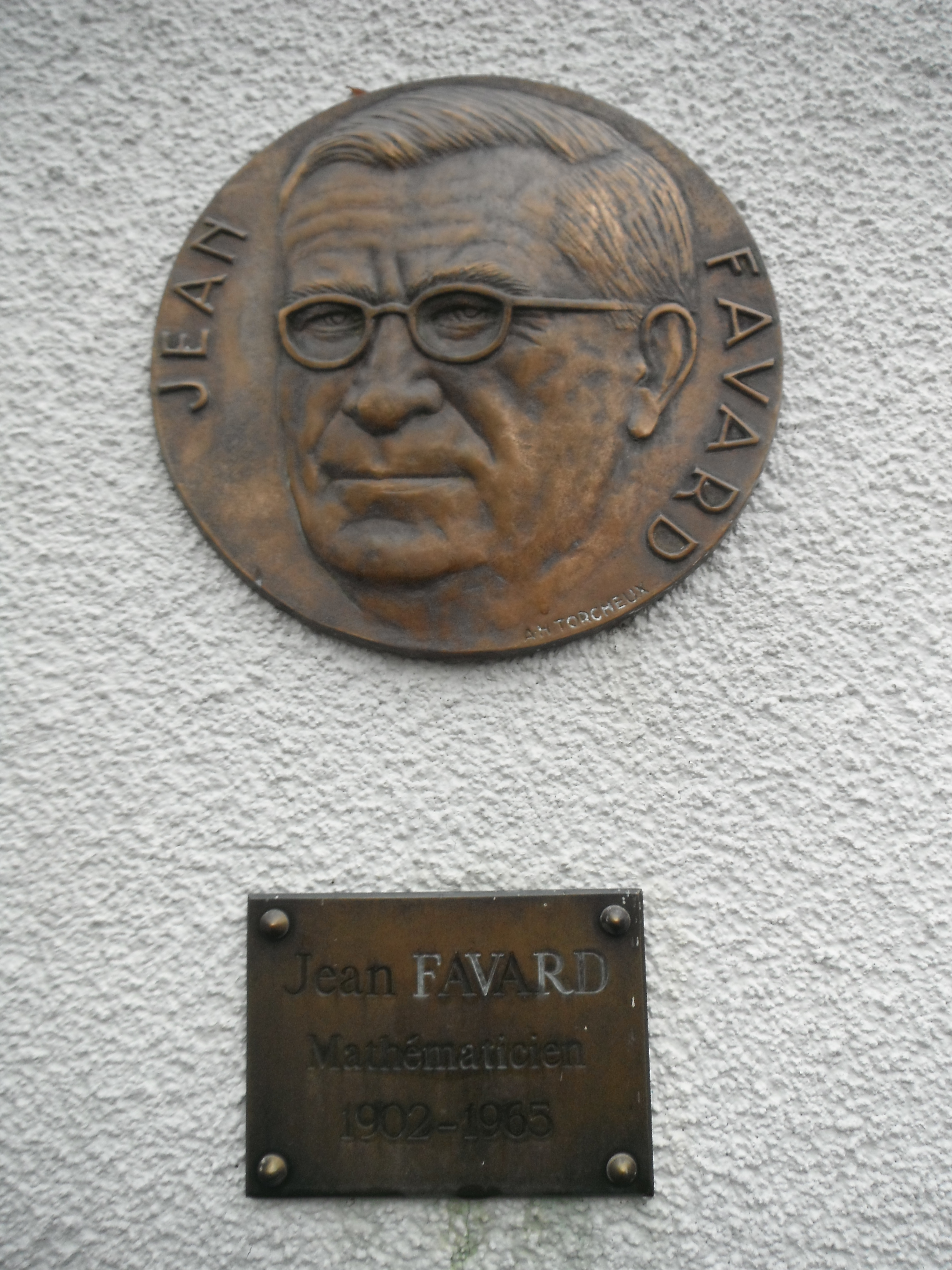 Plaque située à l'entré du lycée Jean Favard